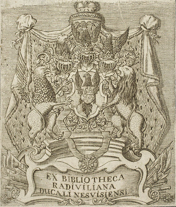 Экслібрыс Нясвіжскай бібліятэкі